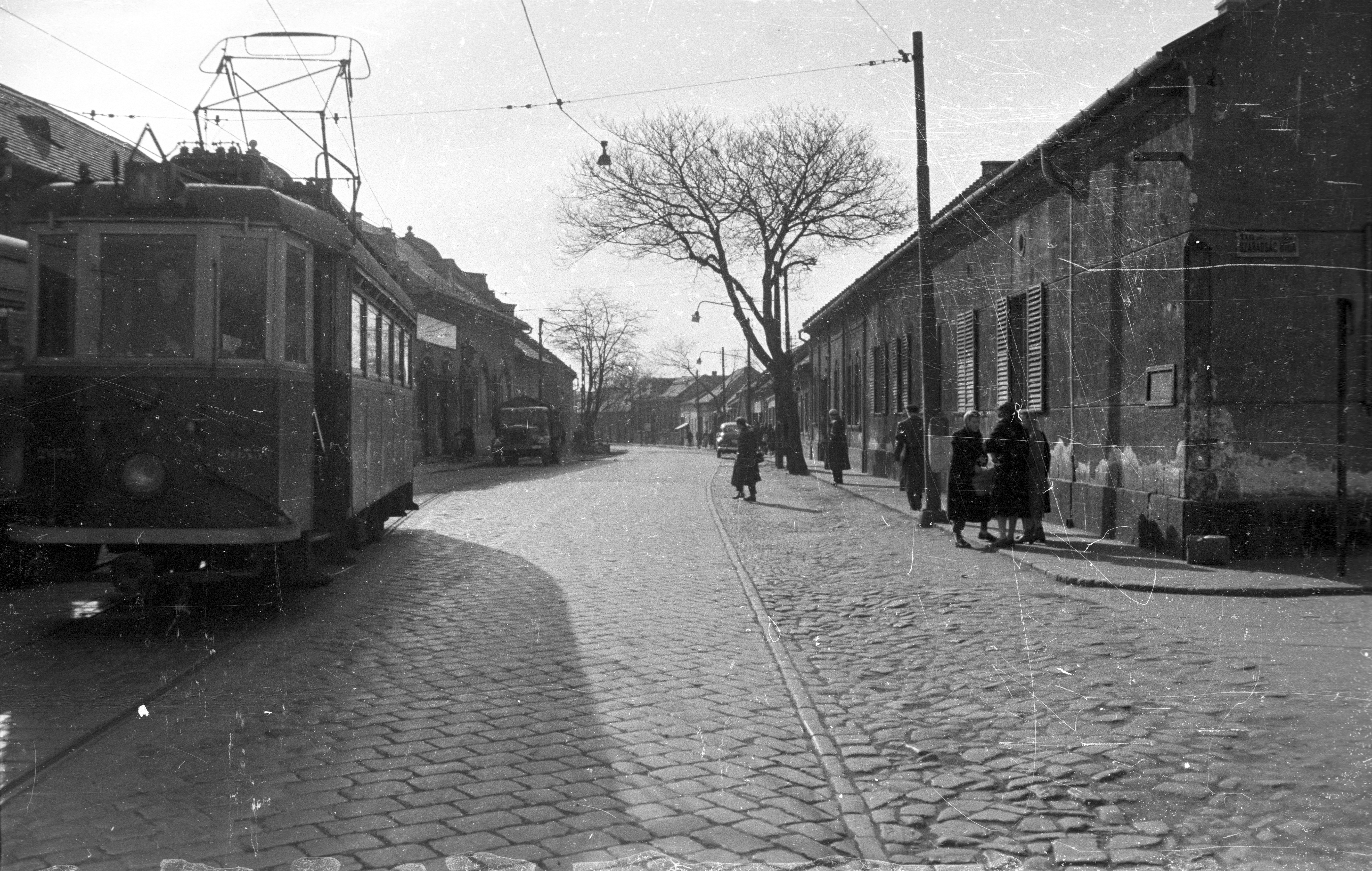 Nagytétényi út (Vörös Hadsereg útja), a HÉV végállomása. Jobbra a Szabadság utca torkolata. Location: Hungary, Budapest XXII. Tags: Budapest, street view, genre painting, commercial vehicle, commuter train, pedestrian Title: Nagytétényi út (Vörös Hadsereg útja), a HÉV végállomása. Jobbra a Szabadság utca torkolata.